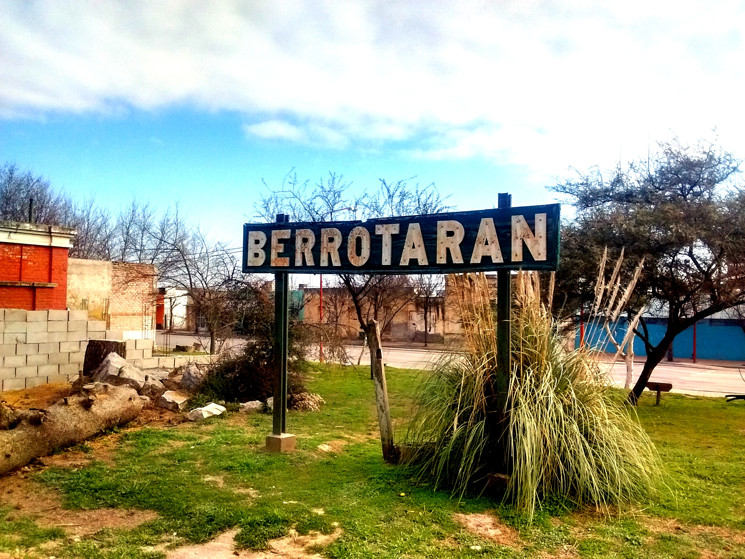 Cartel nomenclador de la estación